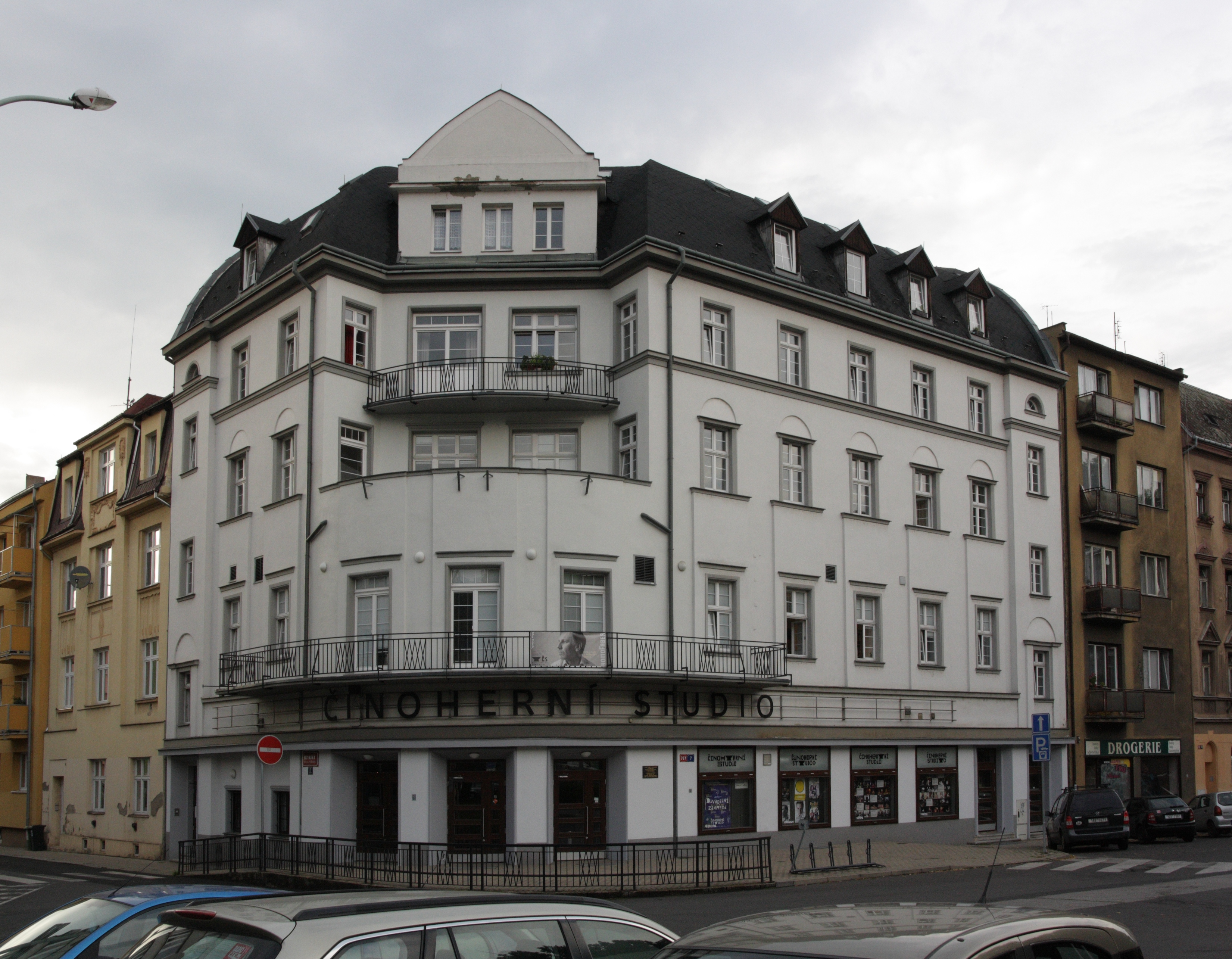 Ústí nad Labem - ulice Varšavská, Činoherní studio